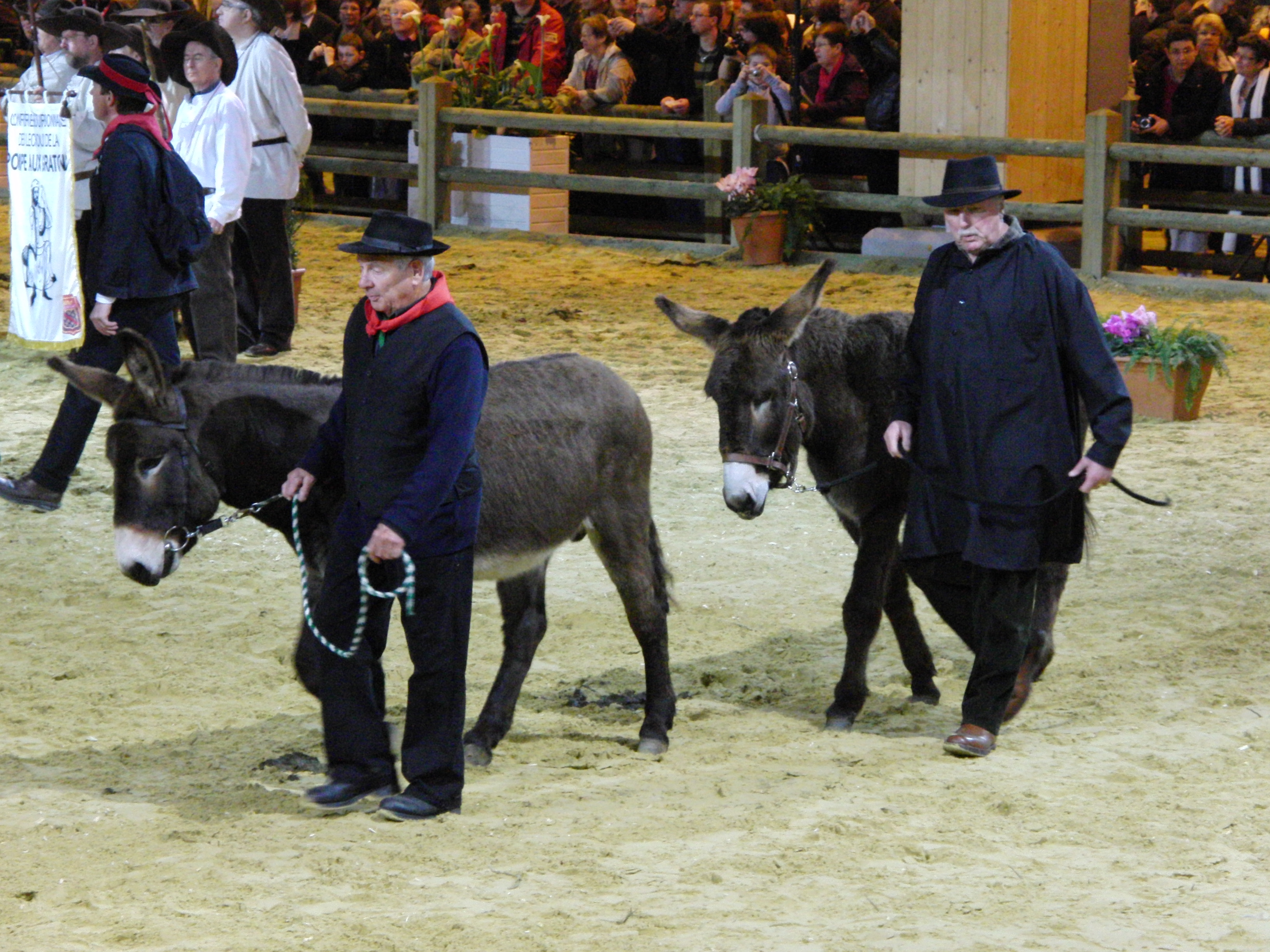 Ânes Bourbonnais - Salon de l'Agriculture 2010